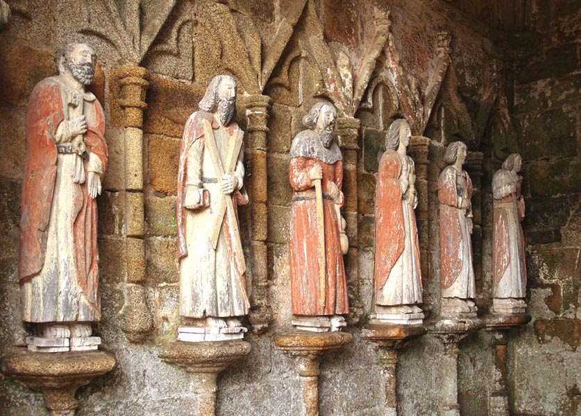 Chapelle Kermaria an Iskuit, commune de Plouha, Côtes-d'Armor (22), France. Porche, interieur ouest.